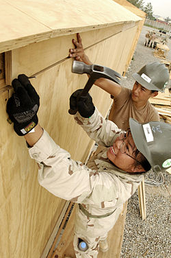 Etxe militar baten eraikuntza, Afganistan